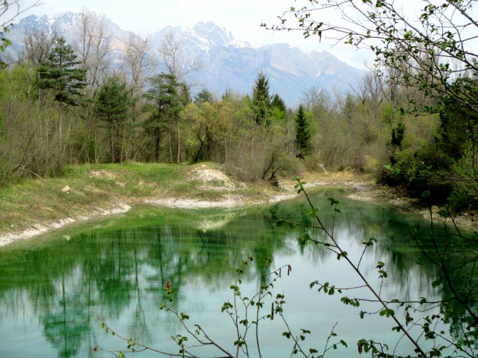 Lago dell'isola presso la Riserva naturale Vincheto di Celarda, Feltre - Belluno - Italia